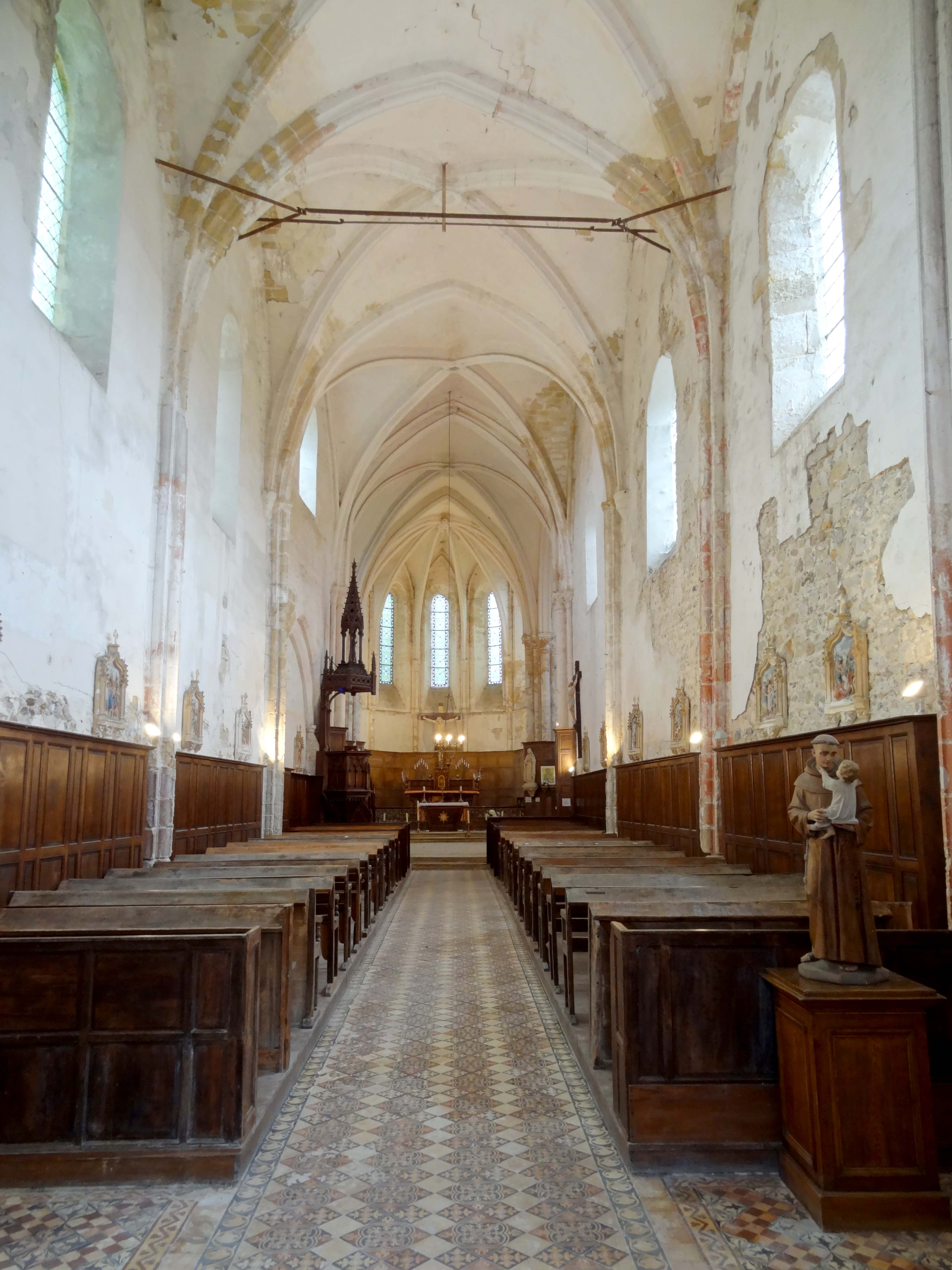 Intérieur de l'église - voir titre.